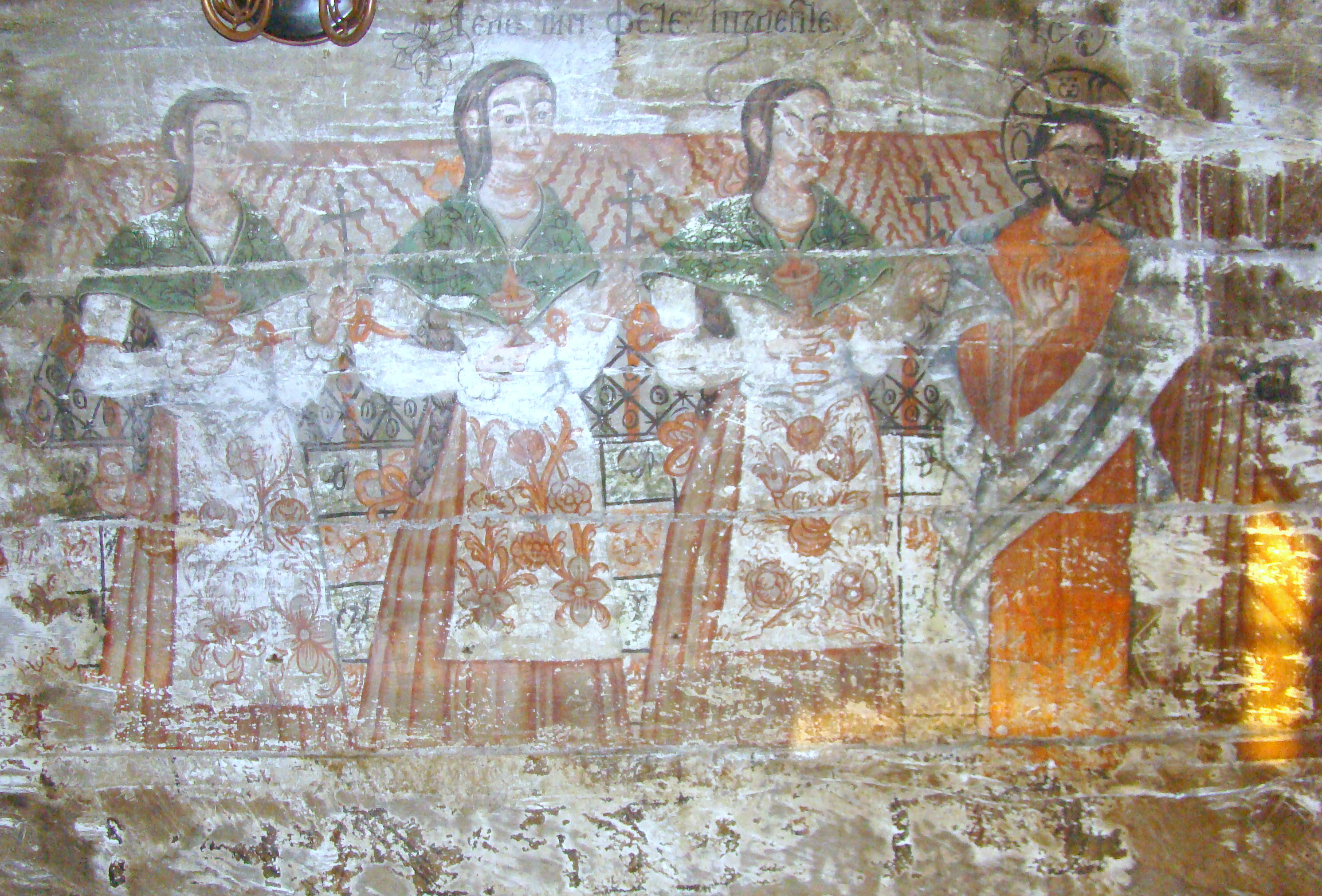 Biserica de lemn "Sfinții Arhangheli Mihail şi Gavriil" din Chieșd, județul Sălaj